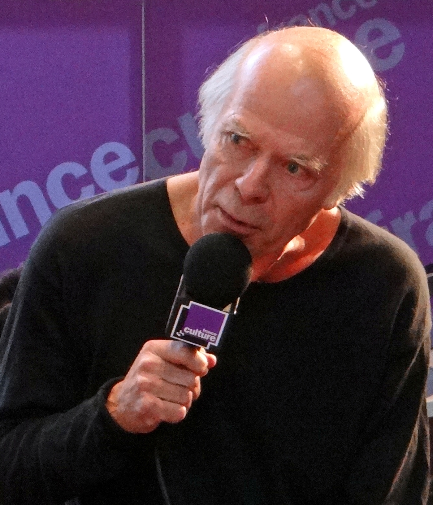 L'écrivain Pascal Quignard en entretien avec Laurent Goumarre pour l'émission "le RDV" sur France Culture.